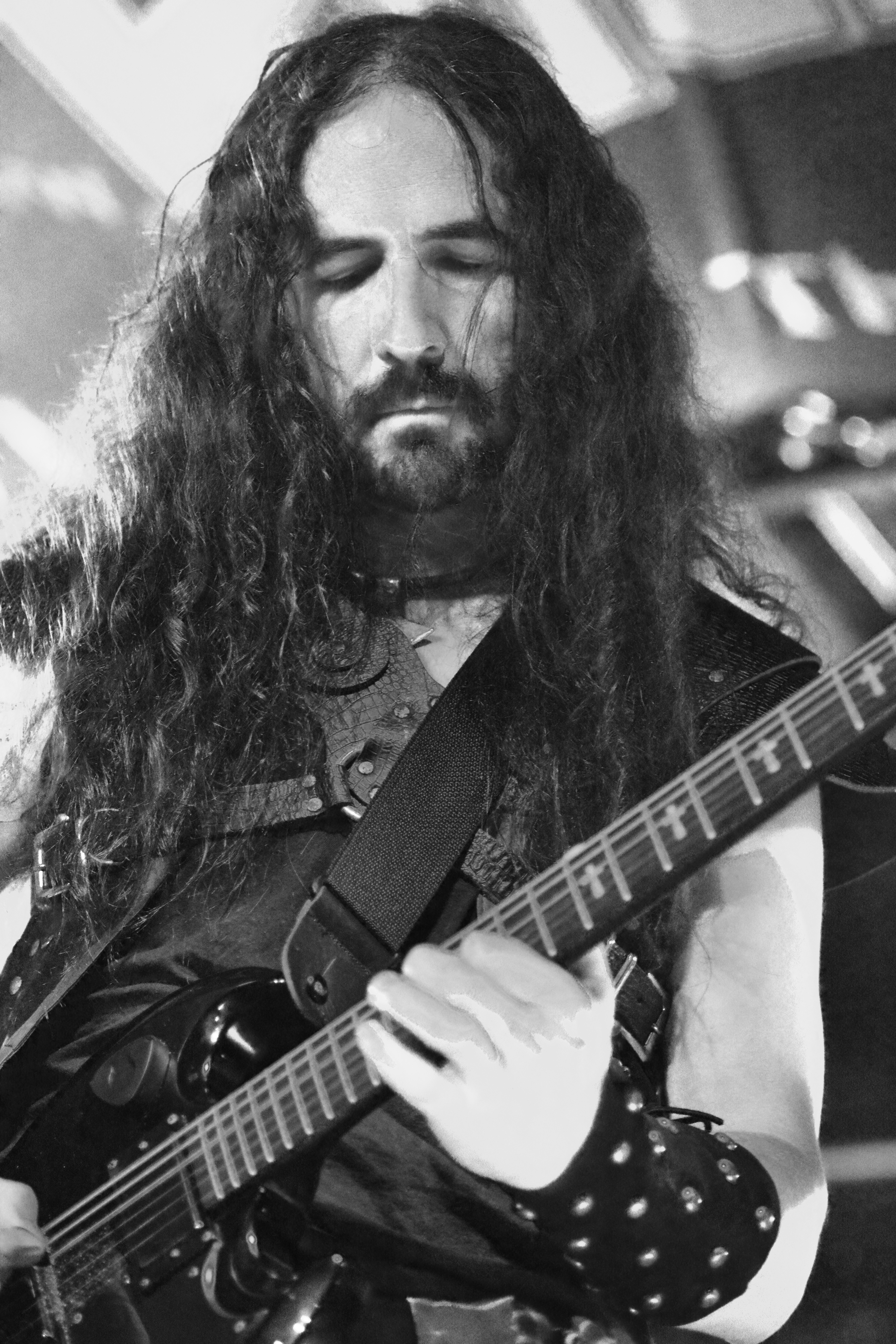 Cruachan beim Hörnerfest 2014